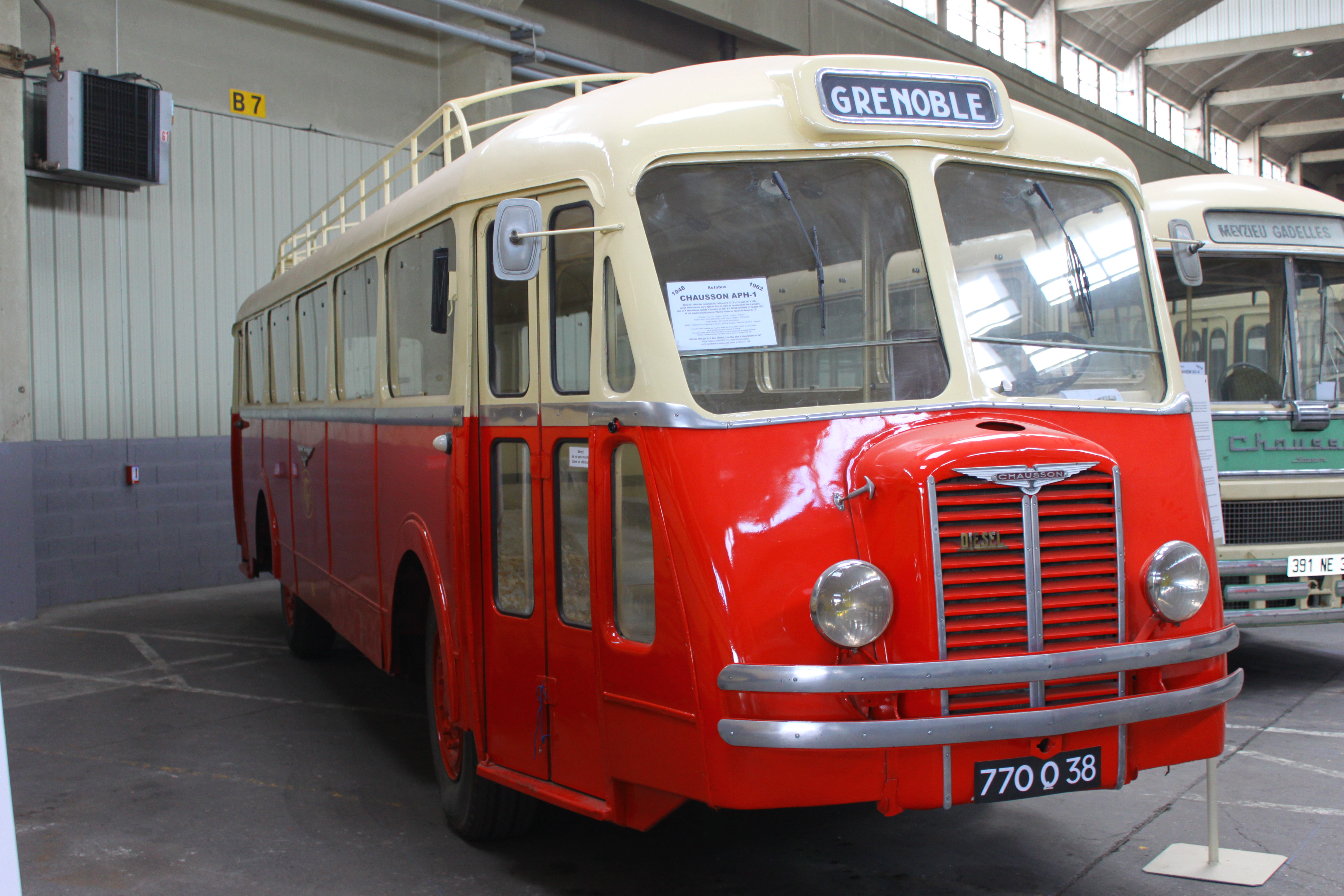 Un autocar Chausson APH-1 restauré aux couleurs de la SGTE par l'association Standard 213 - Histobus grenoblois